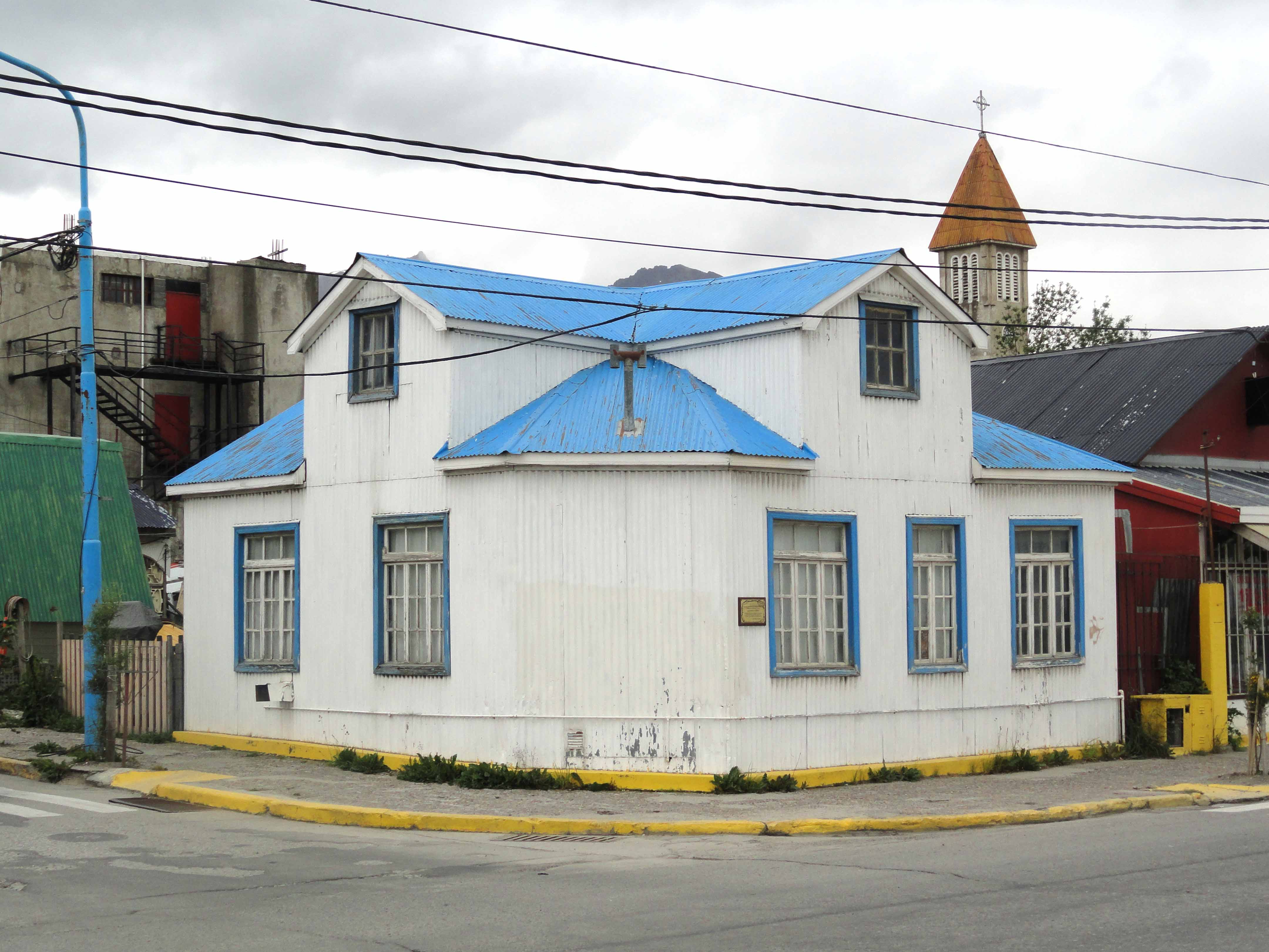 Antiga Casa da escritora Lucinda Otero, Ushuaia